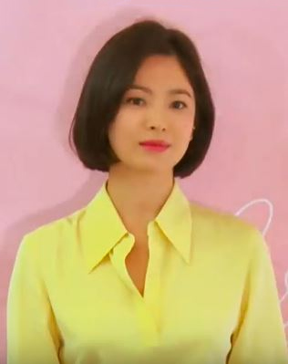 배우 송혜교가 19일 오후 서울 중구 롯데면세점 소공점 LVVIP존인 스타라운지에서 열린 베디베로 포토월 행사에 참석했다.